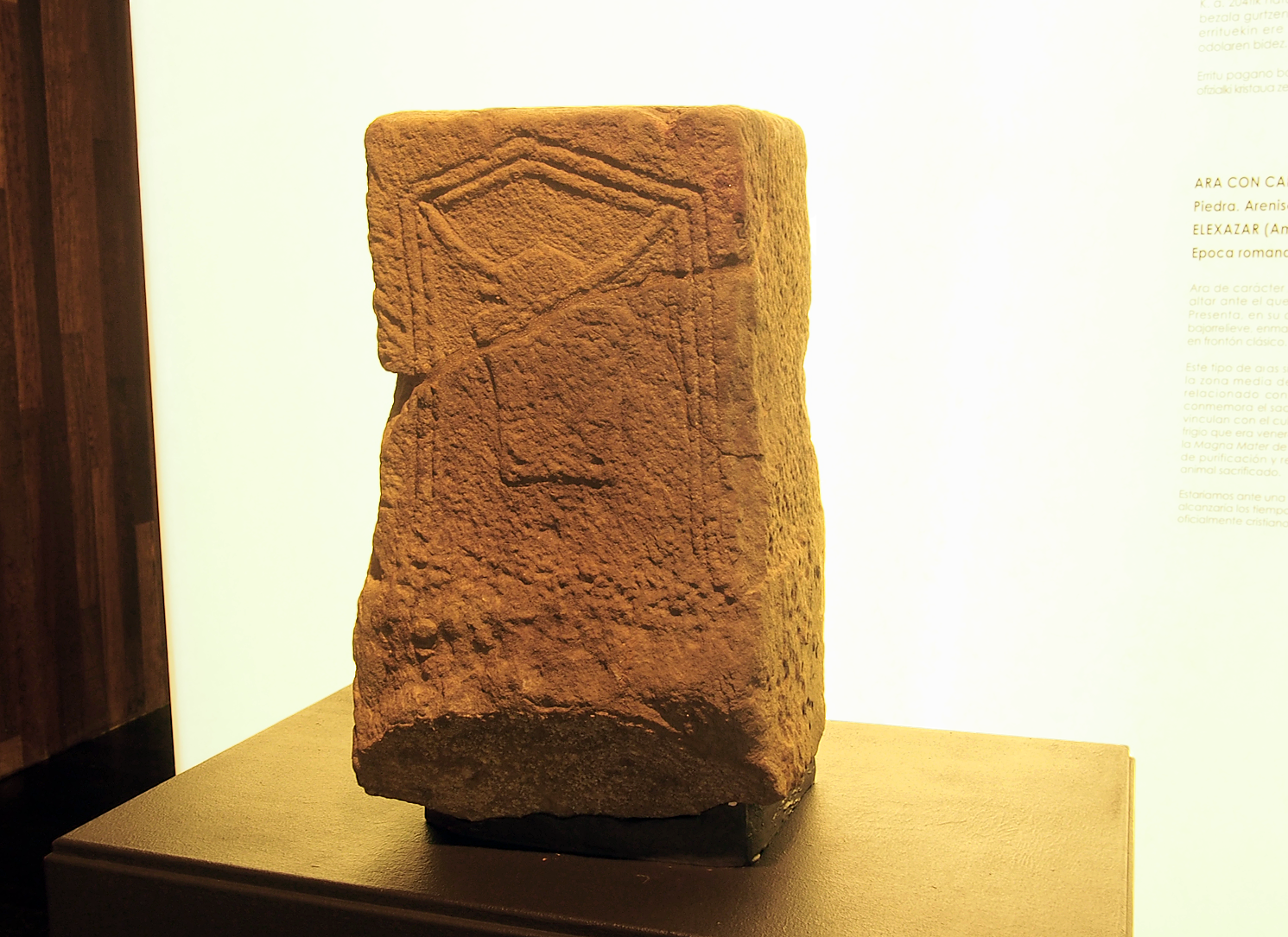 Elexazarren 201. urtean aurkitua. Zibeles gurtzarekin erlazionatuta. Andregoiko honi eta Attis jainkoari egin ohi zitzaizkien taurobolio (taurobolium) eskaintzak egiteko aldarea izan zitekeen. Gasteizko Bibat museoan gordetzen eta erakusten da.